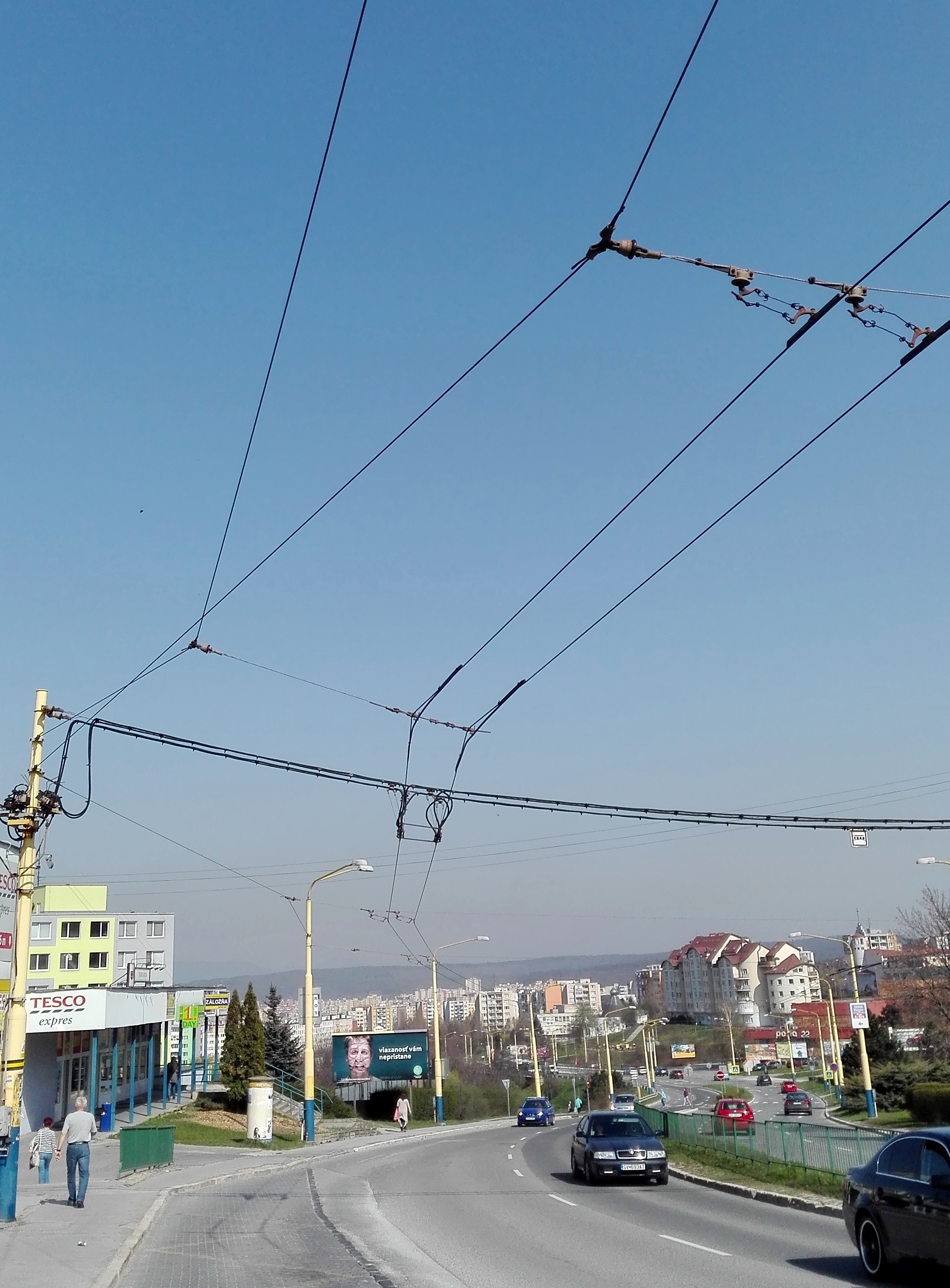 Trolejbusová stopa na Sídlisku dargovských hrdinov, Košice, 2016